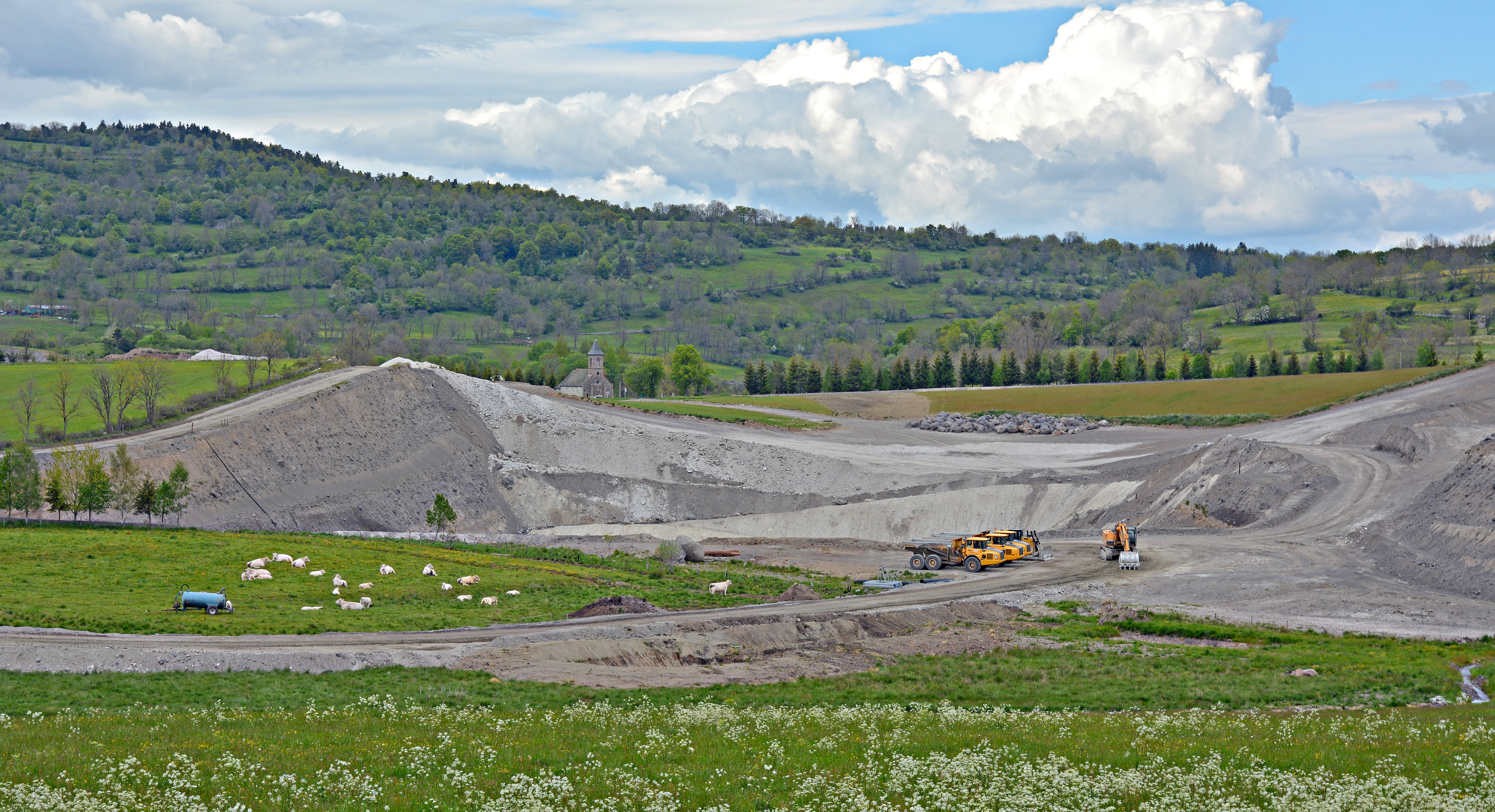 Mine de diatomite de Murat, Cantal, Auvergne, France